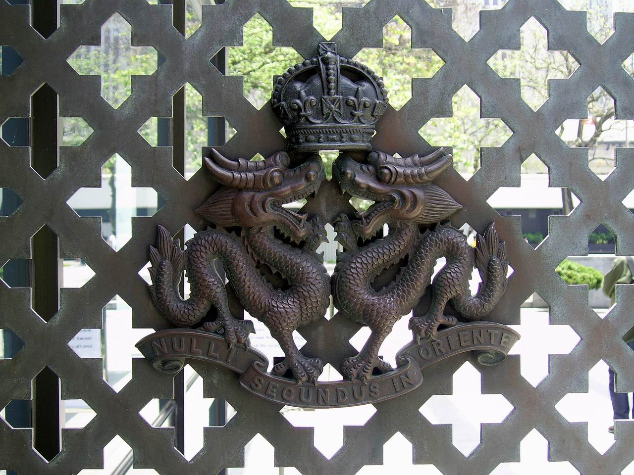 香港大會堂紀念花園銅門上義勇軍紋章